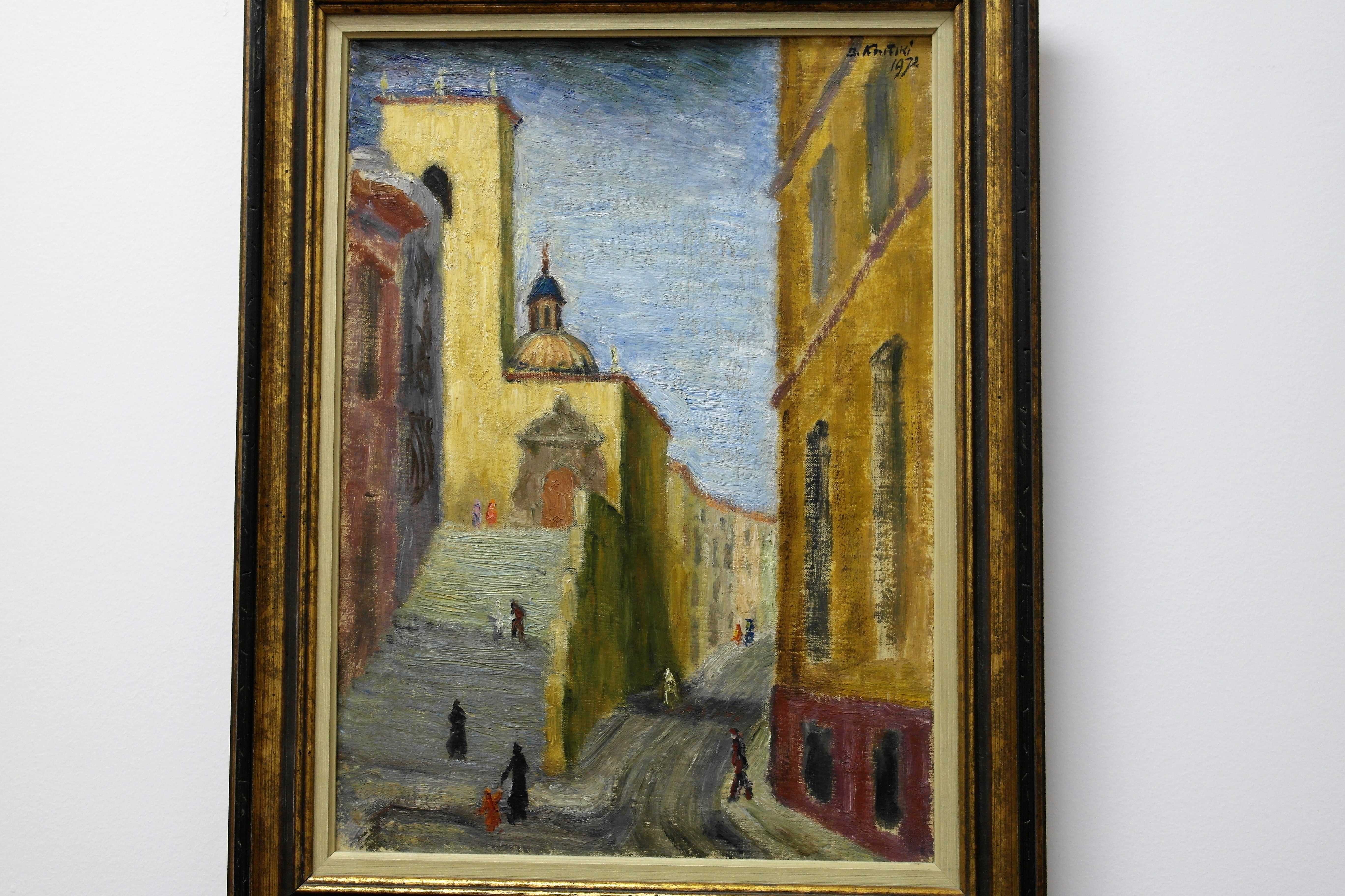 Obraz olejny, 1972, autor Stefan Kątski, fot. K. Szrodt